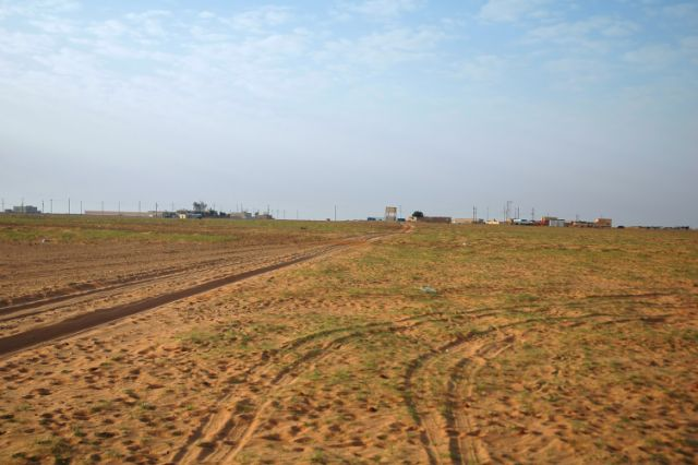 قرية المتياهة الجنوبية